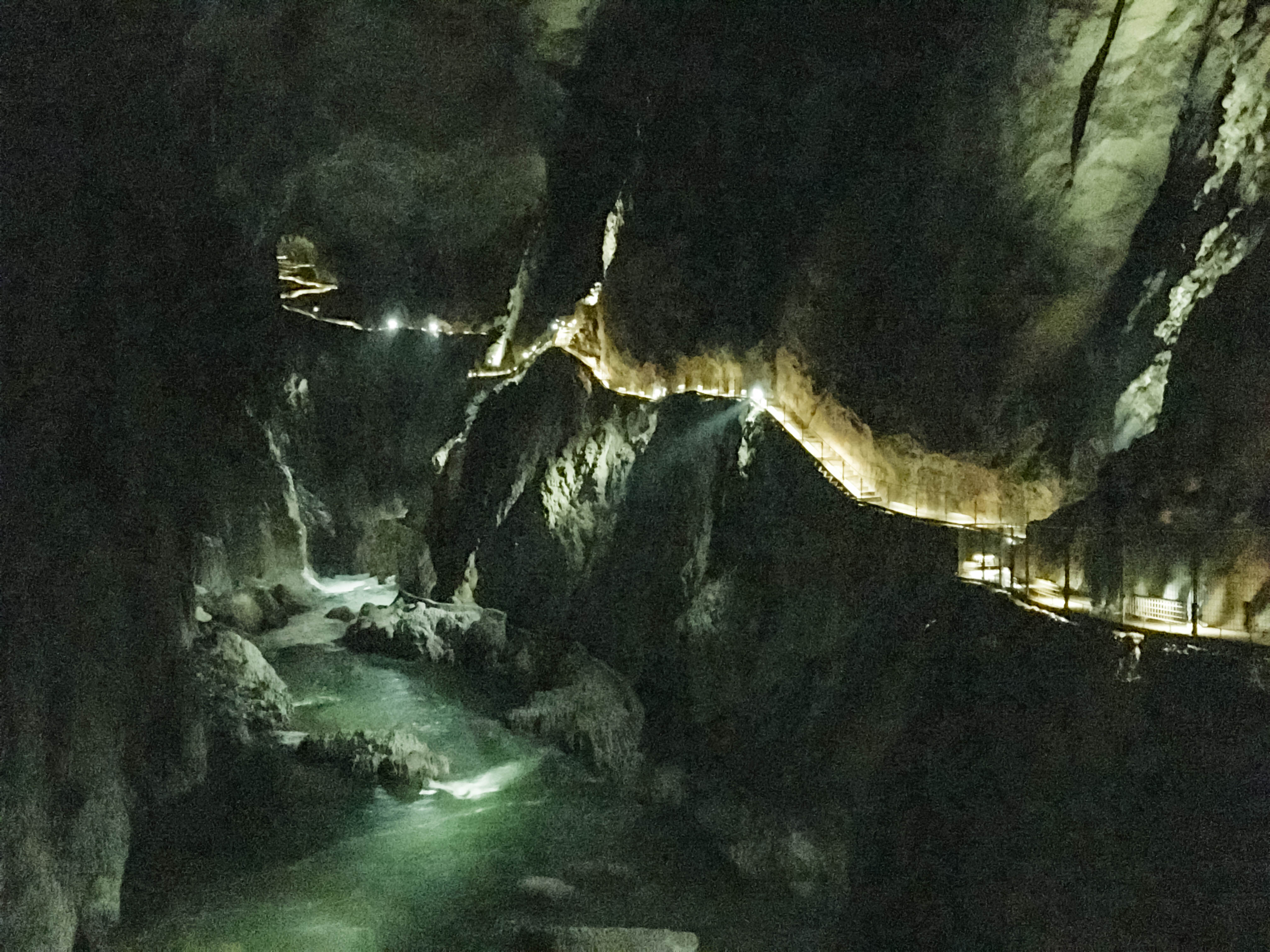 Slovenia